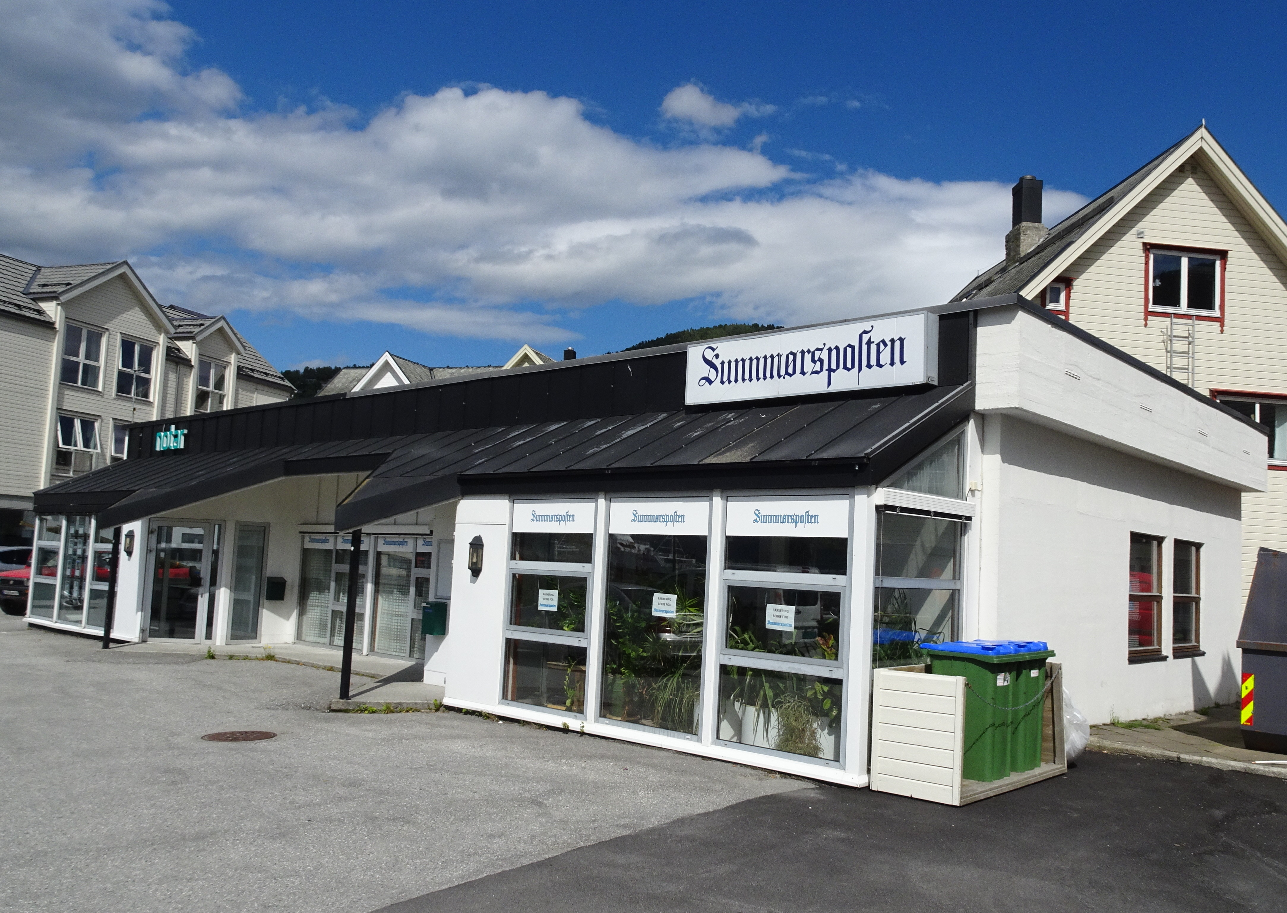 Sunnmørspostens lokaler i Volda